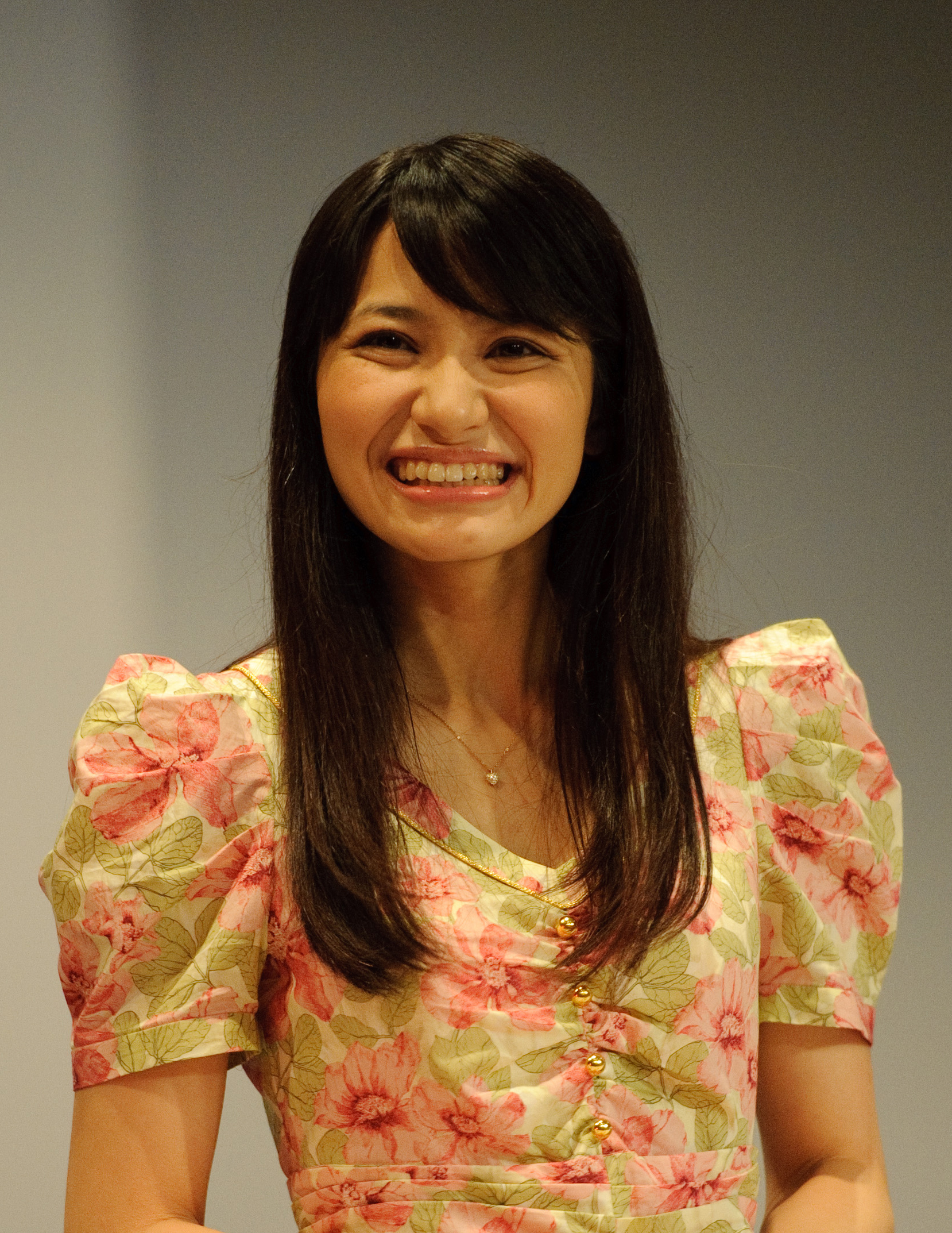 Mamegu panel at AX